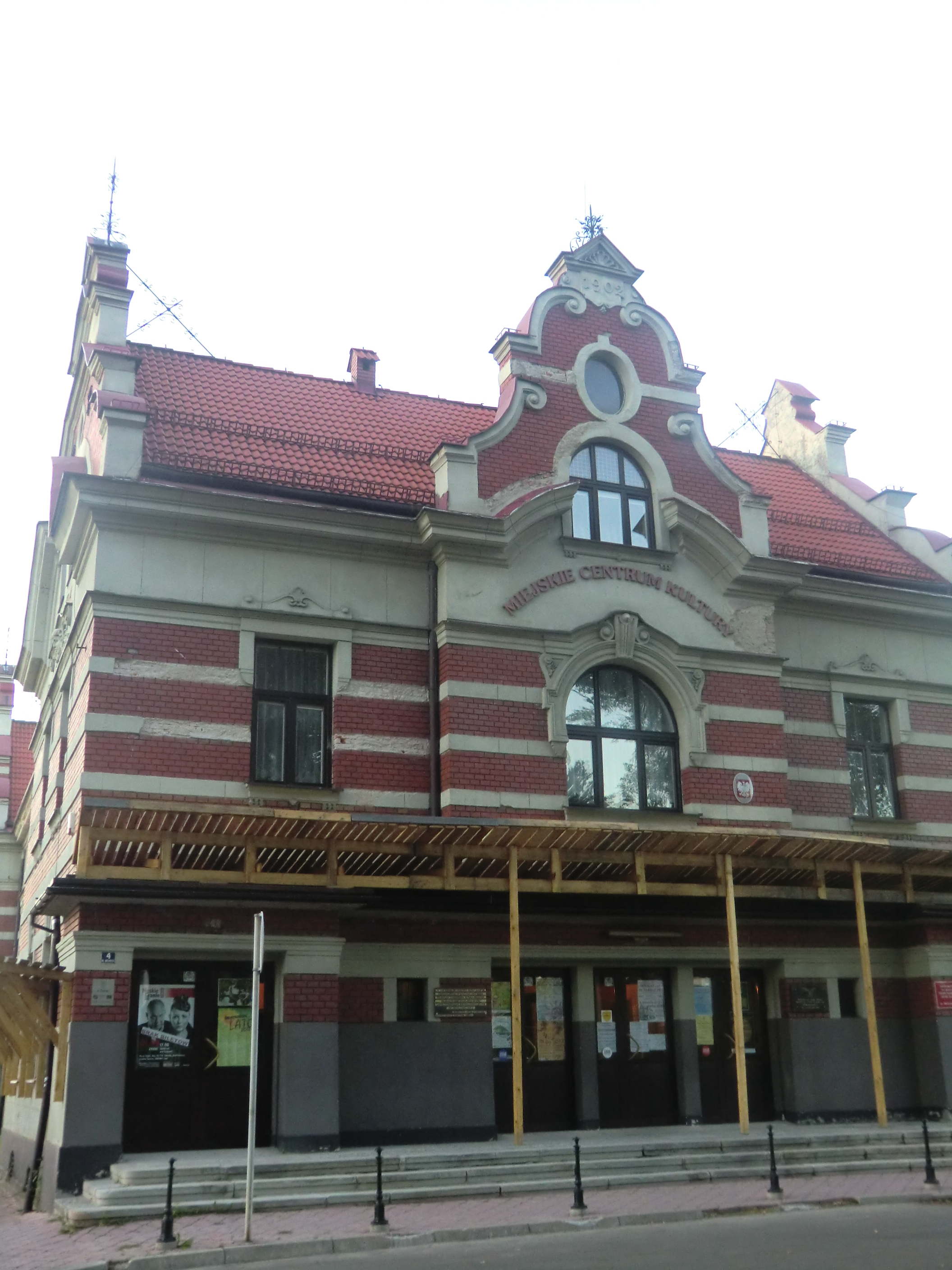 Budynek Młodzieżowego Domu Kultury - Żywiec, ul. Wolności 4